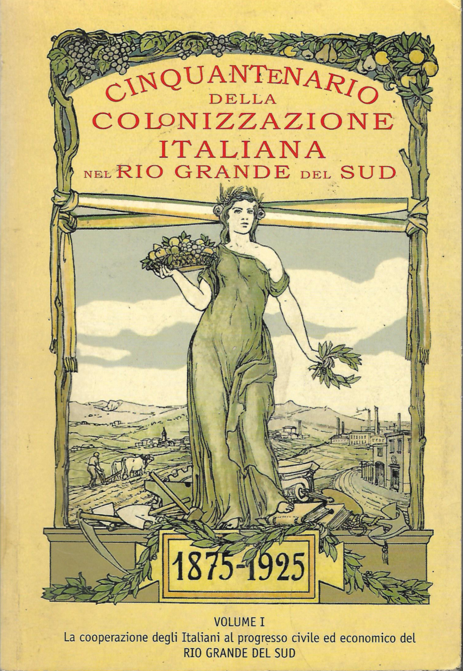 Capa do álbum comemorativo Cinquantenario della Colonizzazione Italiana nel Rio Grande del Sud 1875-1925